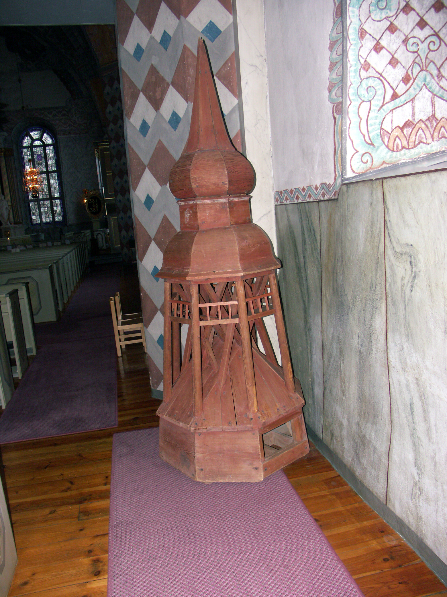 Model till kyrktornet i Ljusdal av Per Jonsson